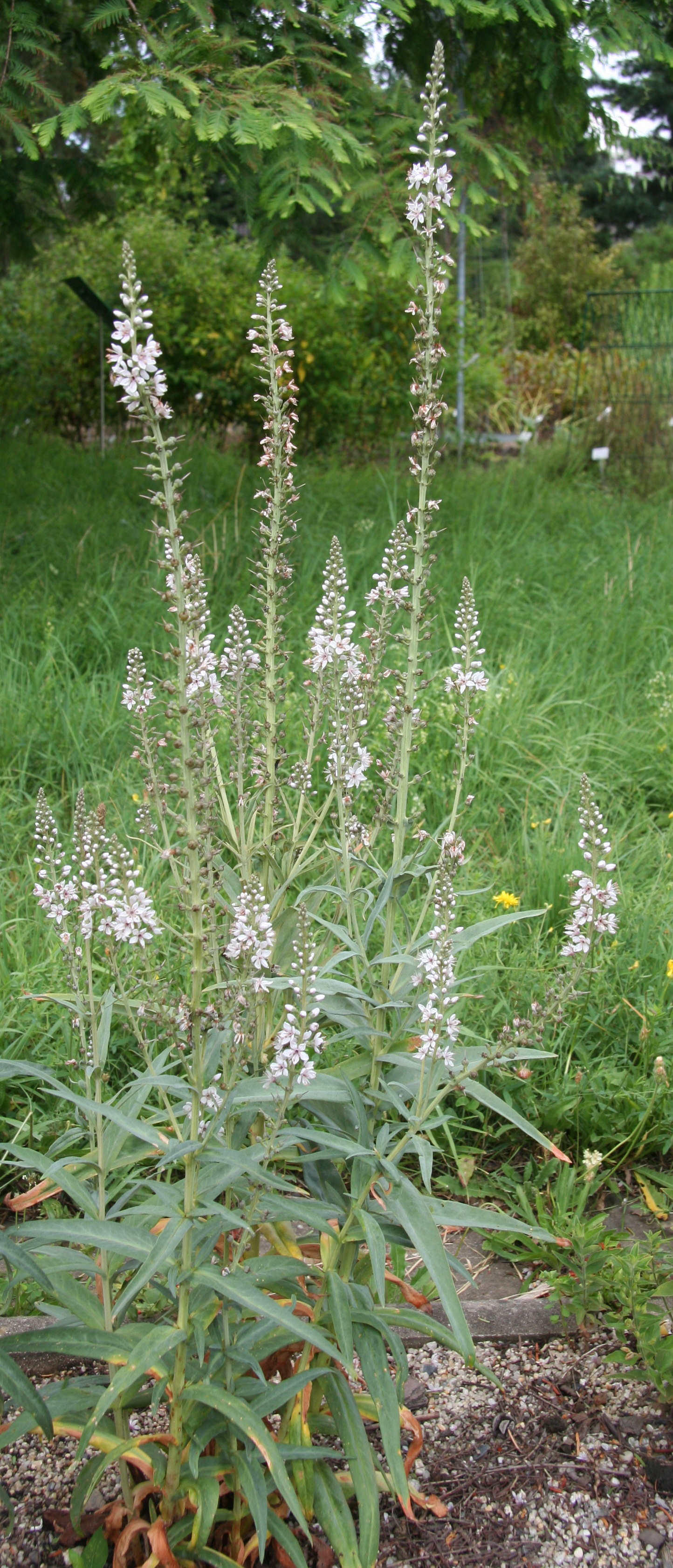 Lysimachia ephemerum im Botanischen Garten Dresden